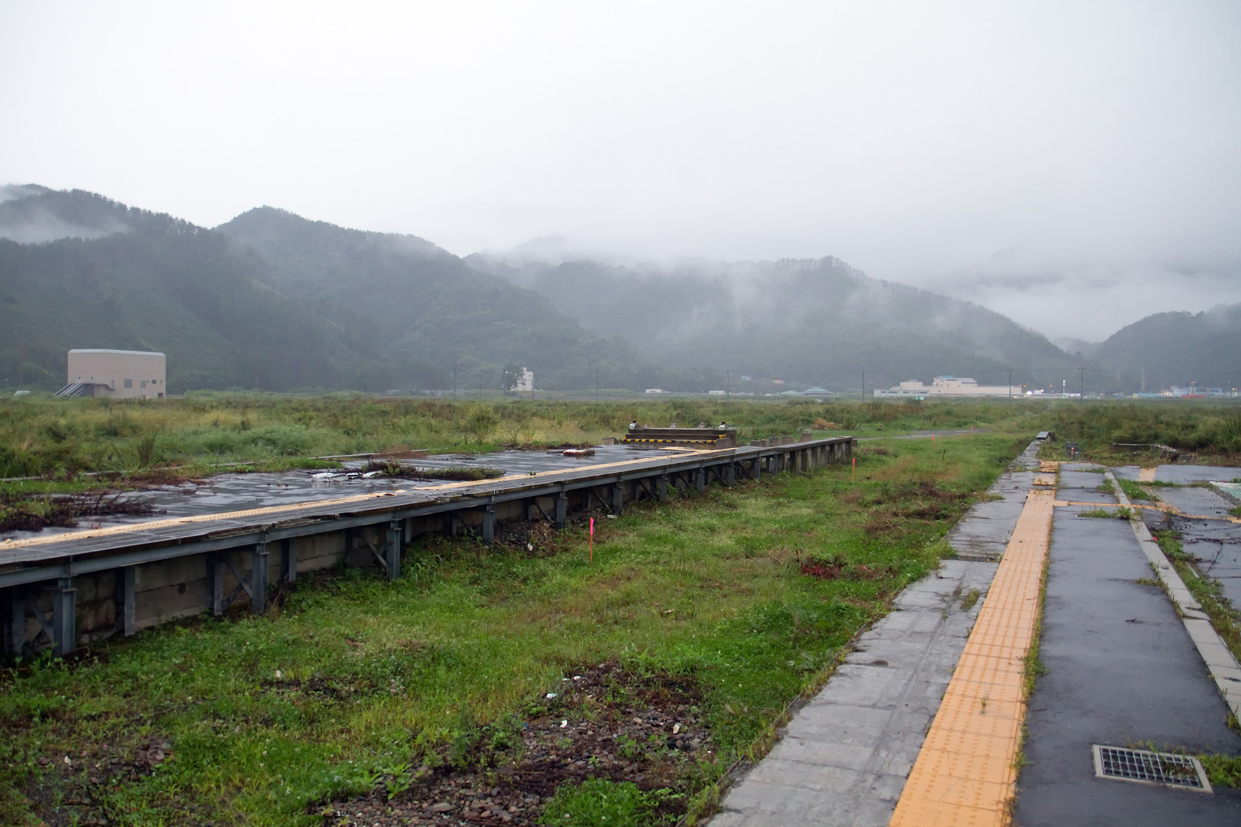 2013年９月当時の大槌駅構内